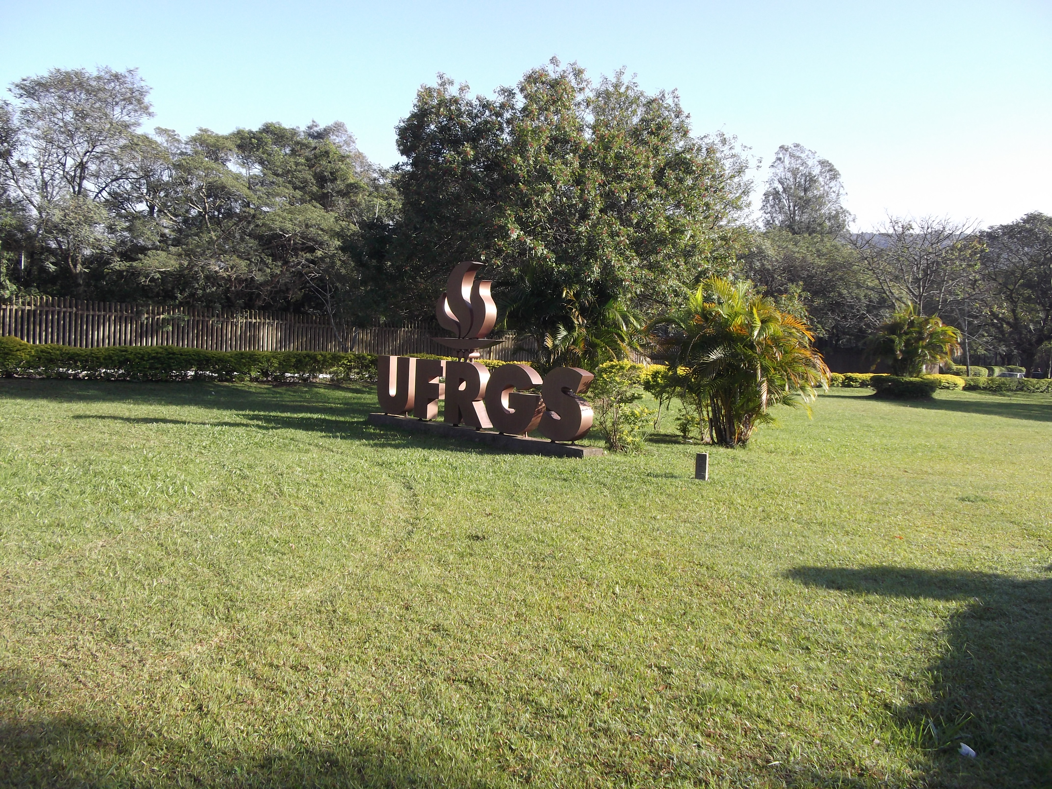 Entrada do Campus do Vale, da Universidade Federal do Rio Grande do Sul